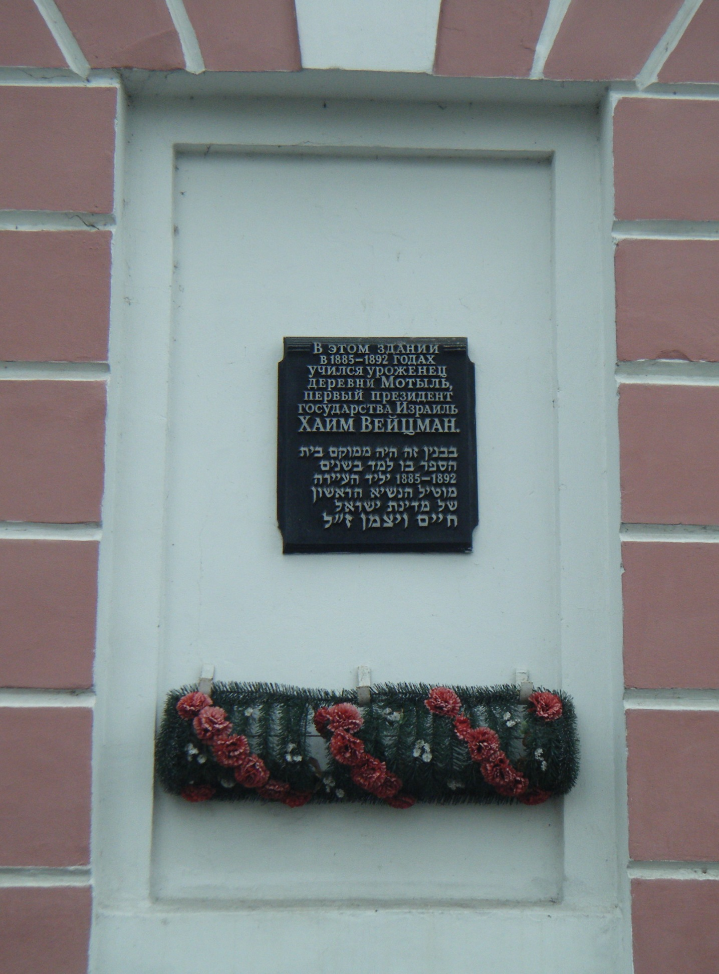 Мемориальная табличка на доме в Пинске по улице Ленина, 39, в котором учился Chaim Weizmann (Хаим Вейцман)